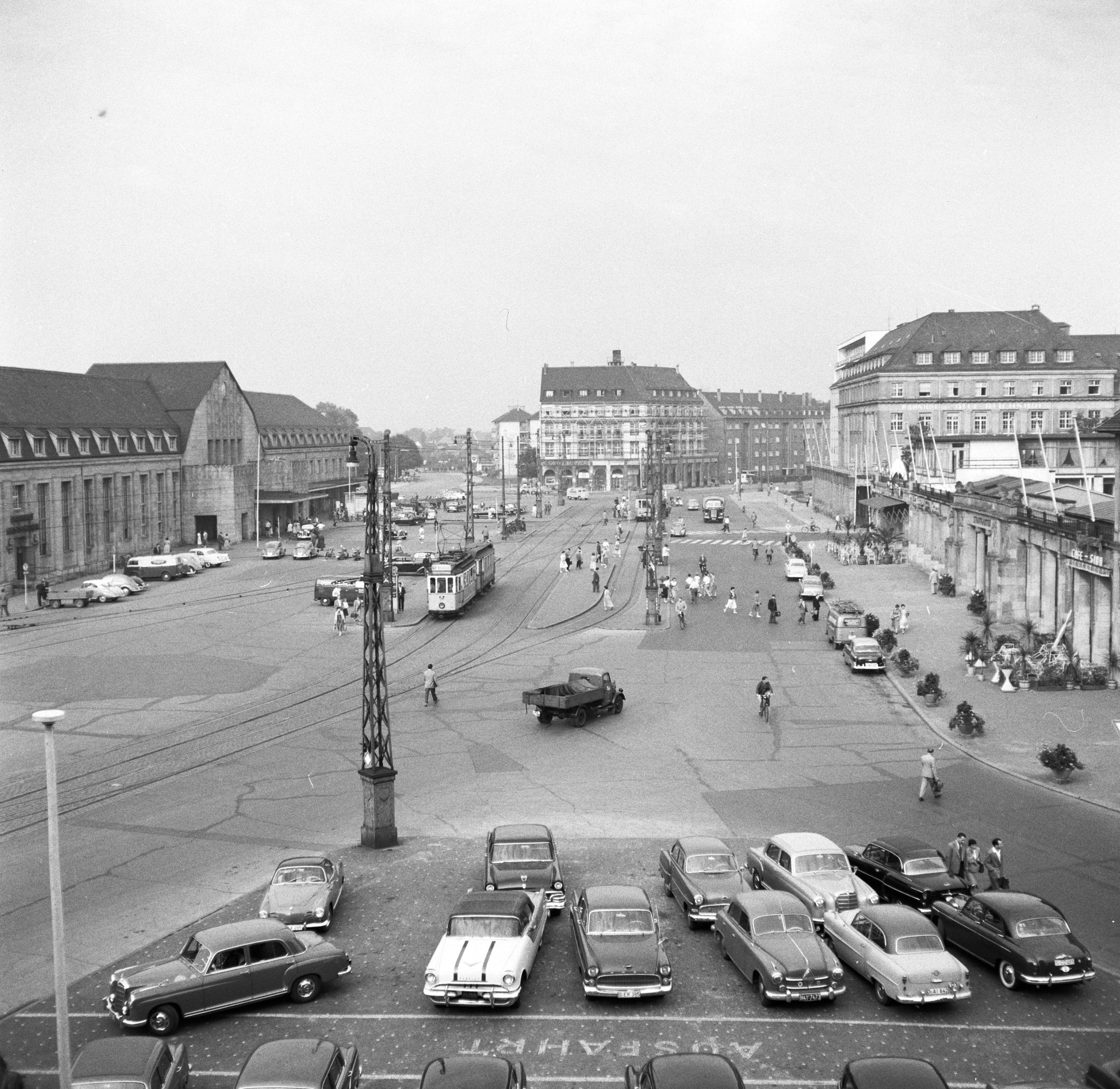 Collectie / Archief : Fotocollectie Van de Poll Reportage / Serie : Rijnvaart, reportage over het leven en werken aan boord van een Rijnschip Beschrijving : Gezicht op het stationsplein in Karlsruhe Datum : 1 april 1955 Locatie : Duitsland, Karlsruhe, West-Duitsland Trefwoorden : auto's, gebouwen, stadsbeelden, trams, vrachtwagens Fotograaf : Poll, Willem van de Auteursrechthebbende : Nationaal Archief Materiaalsoort : Negatief (6x6) Nummer archiefinventaris : bekijk toegang 2.24.14.02 Bestanddeelnummer : 254-1795